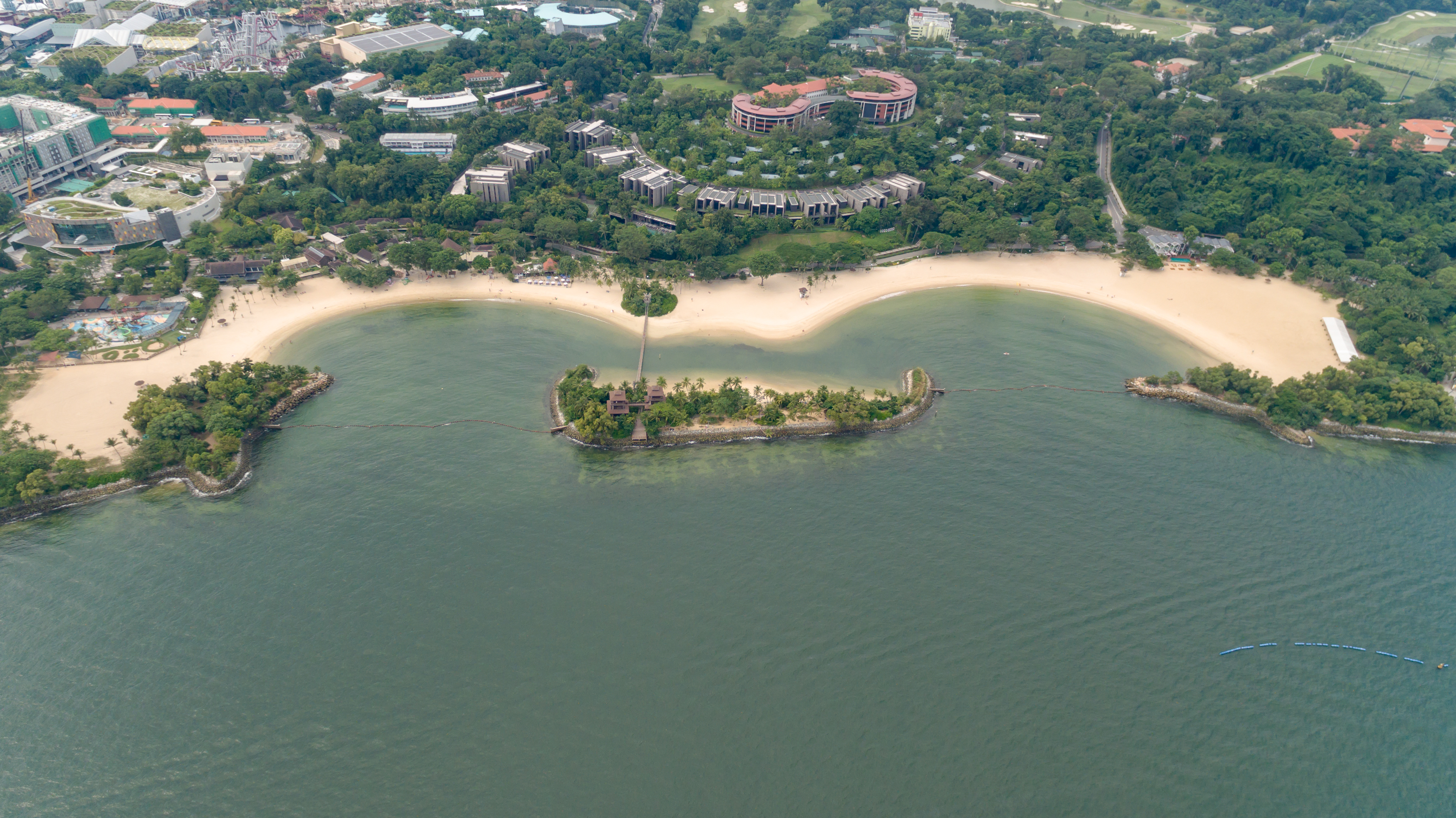 Palawan Beach Sentosa Singapore Singapur Singapore Luftbild aerial